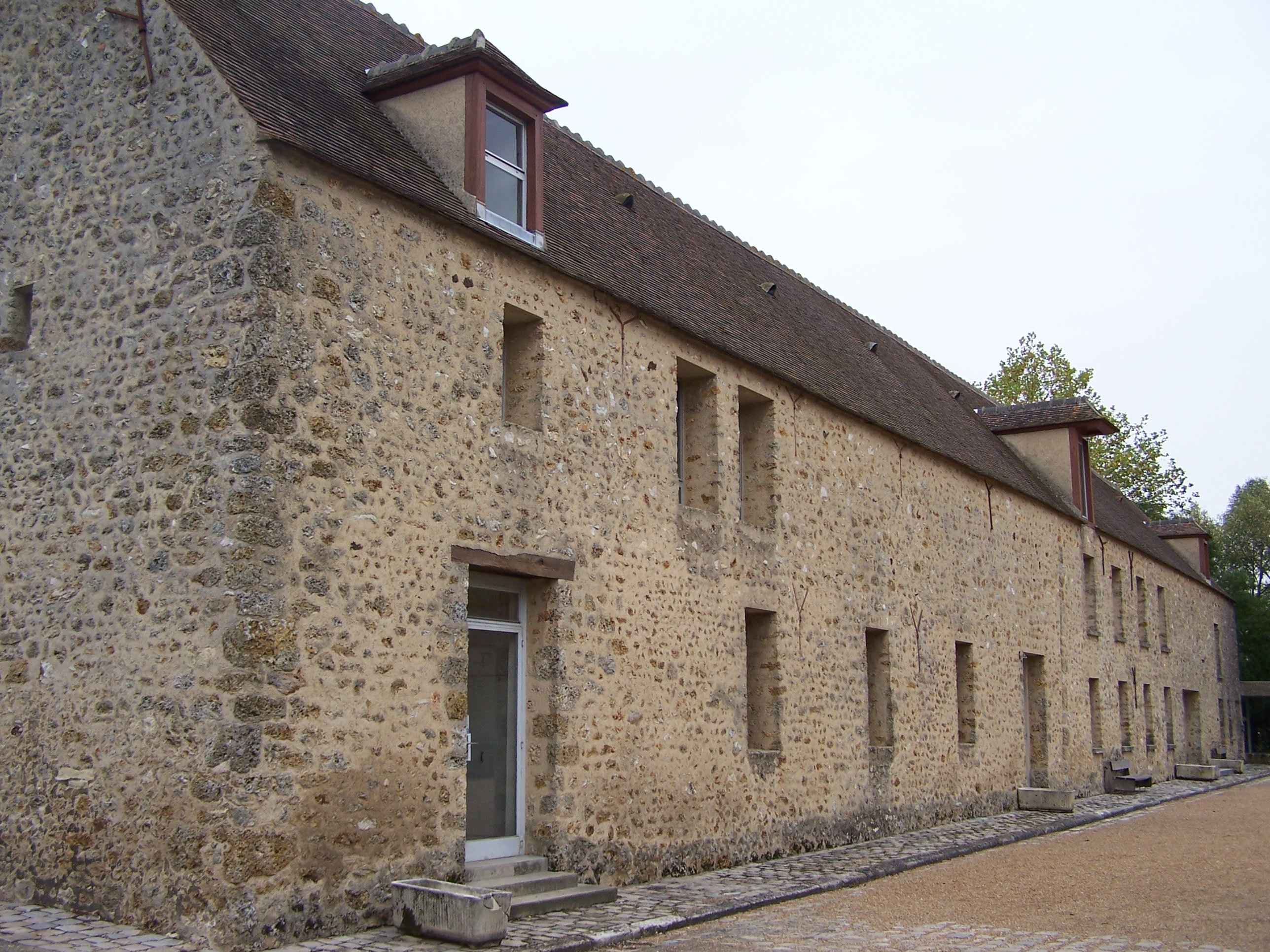 Bâtiment nord de la Commanderie des Templiers à Élancourt (Yvelines, (France)